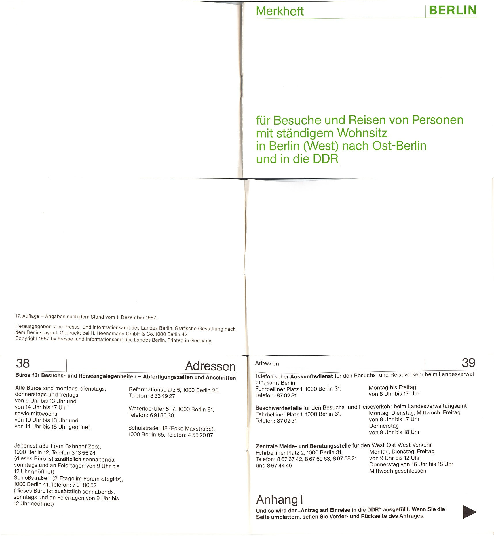 Merkheft für Besuche und Reisen von Personen mit ständigem Wohnsitz in Berlin (West) nach Ost-Berlin und in die DDR (in Auszügen) Seiten 0, 38, 39, 51. 17. Auflage 01.12.1987